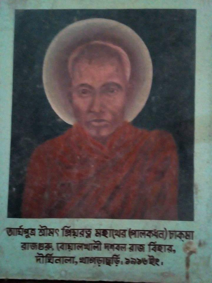 Rajguru Priyo Ratana Mahathera